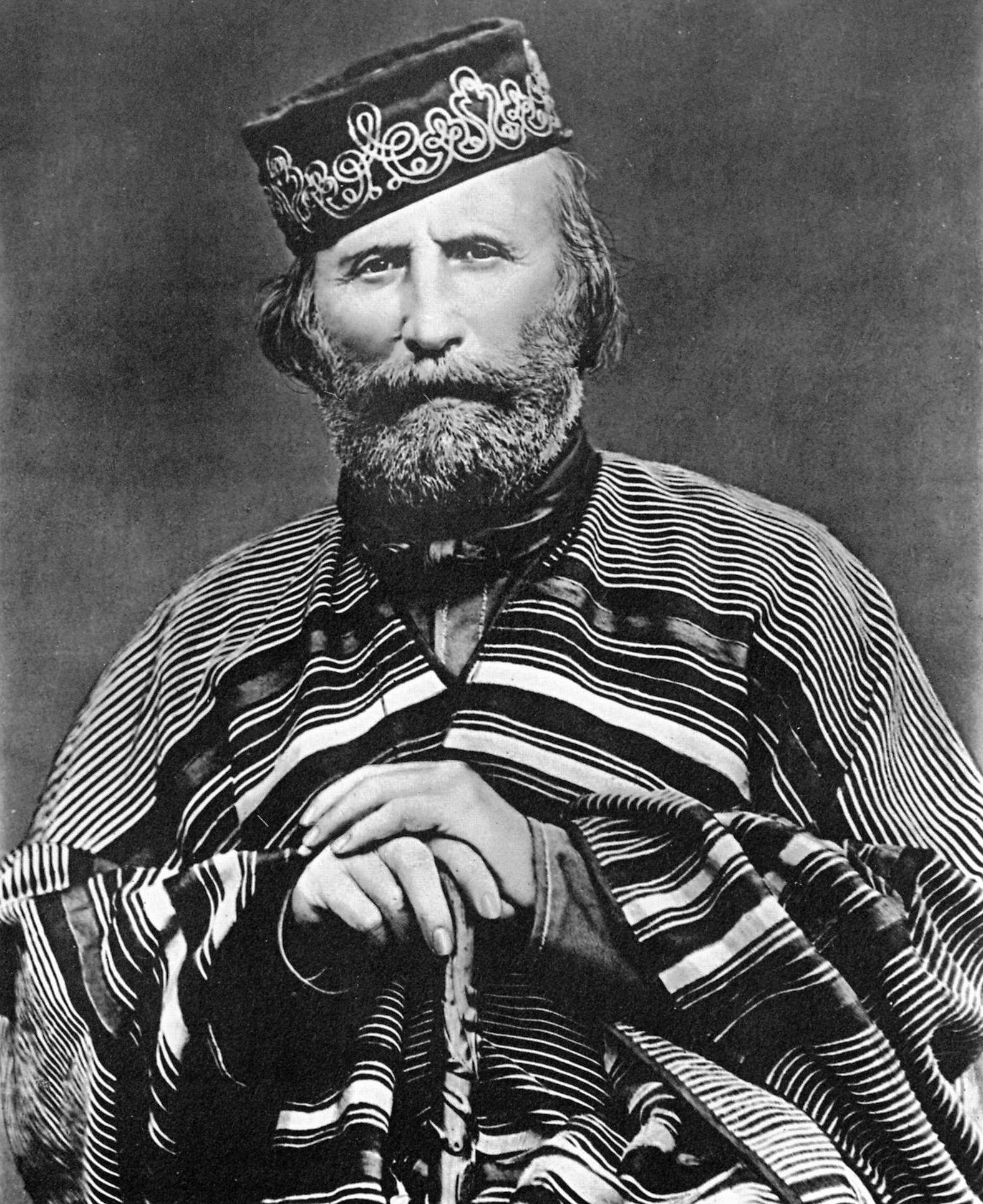 Giuseppe Garibaldi.